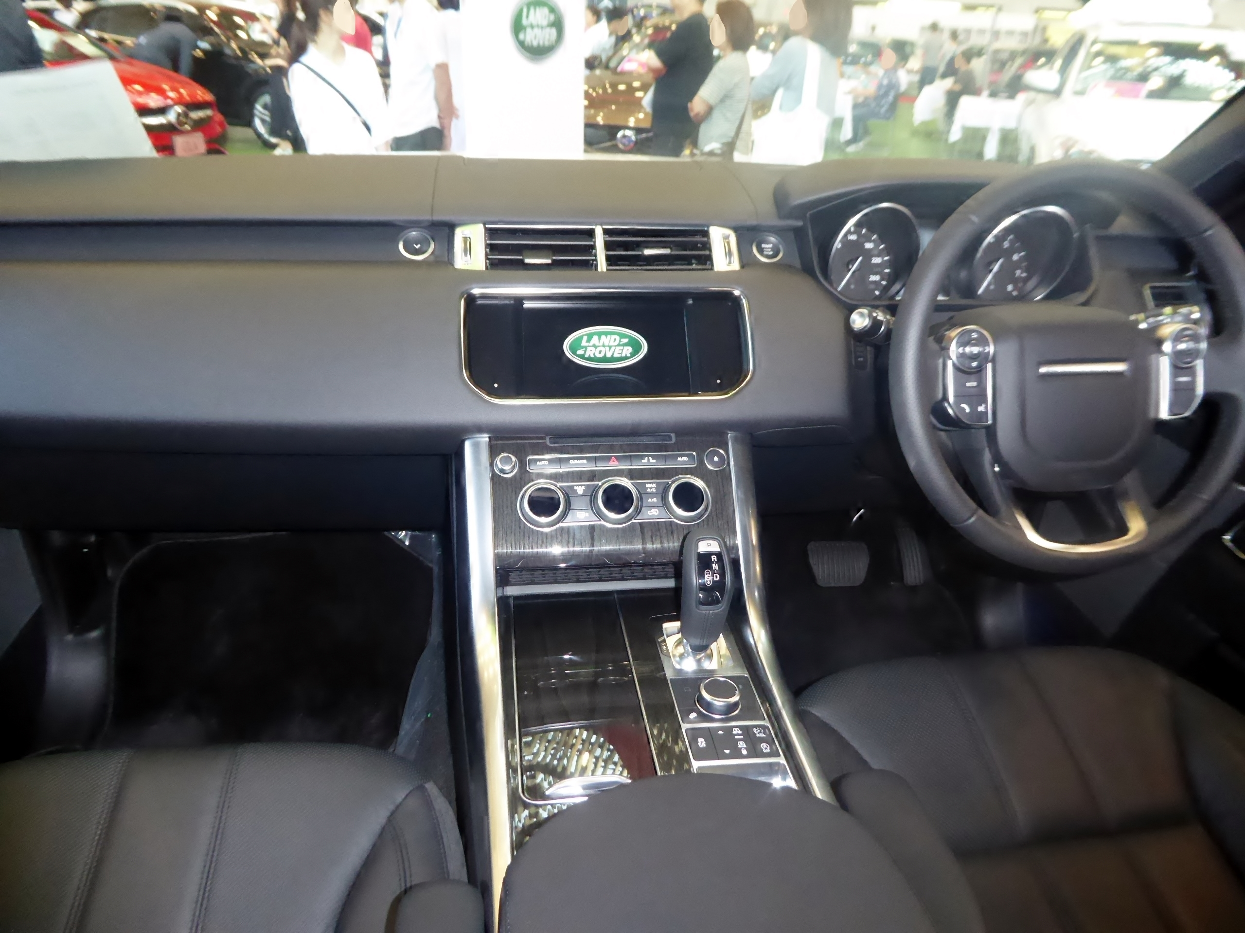 L494系ランドローバー・レンジローバースポーツHSEのインテリアを撮影。